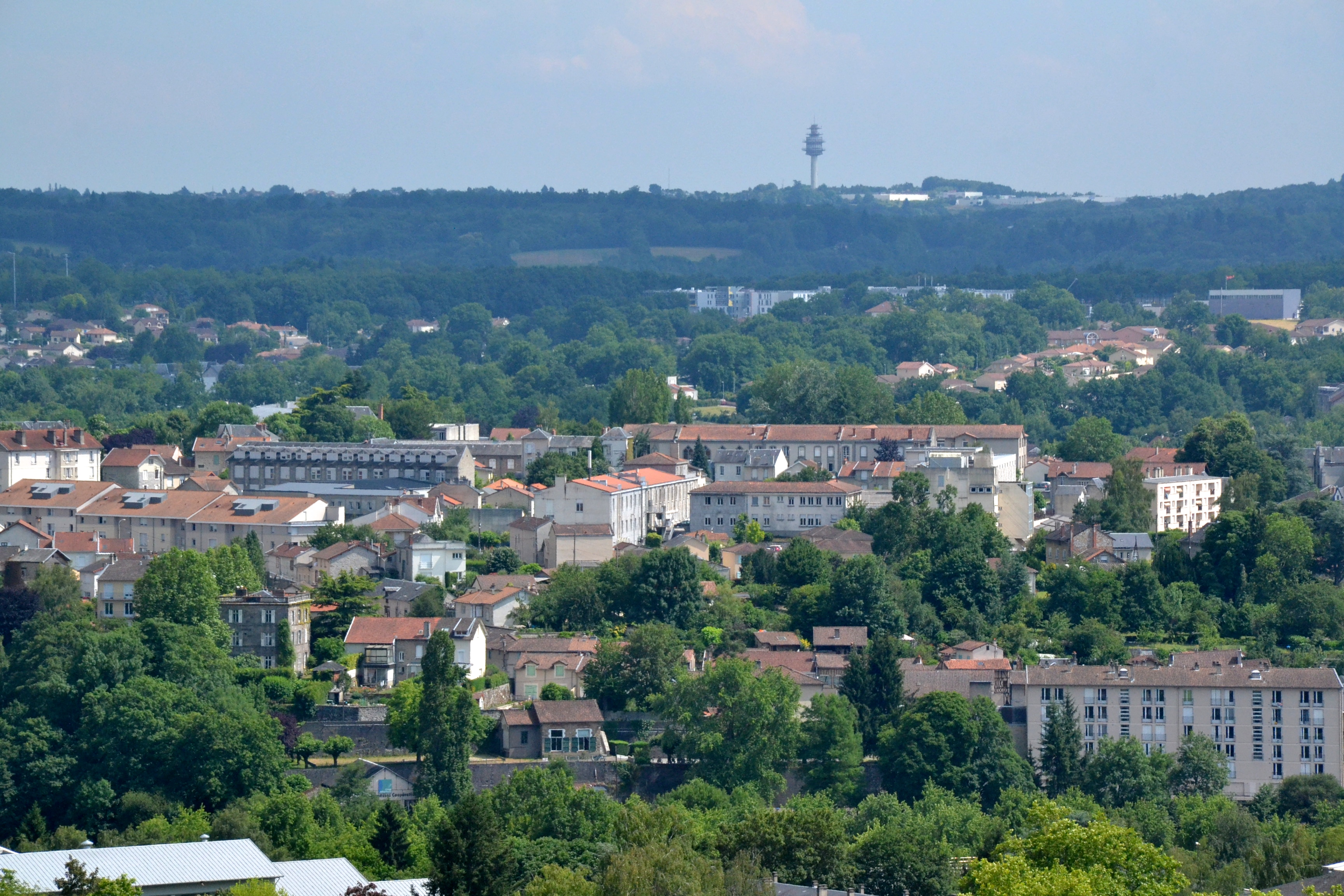 Vue sur le quartier du Sablard, Saint-Lazare puis Boisseuil.